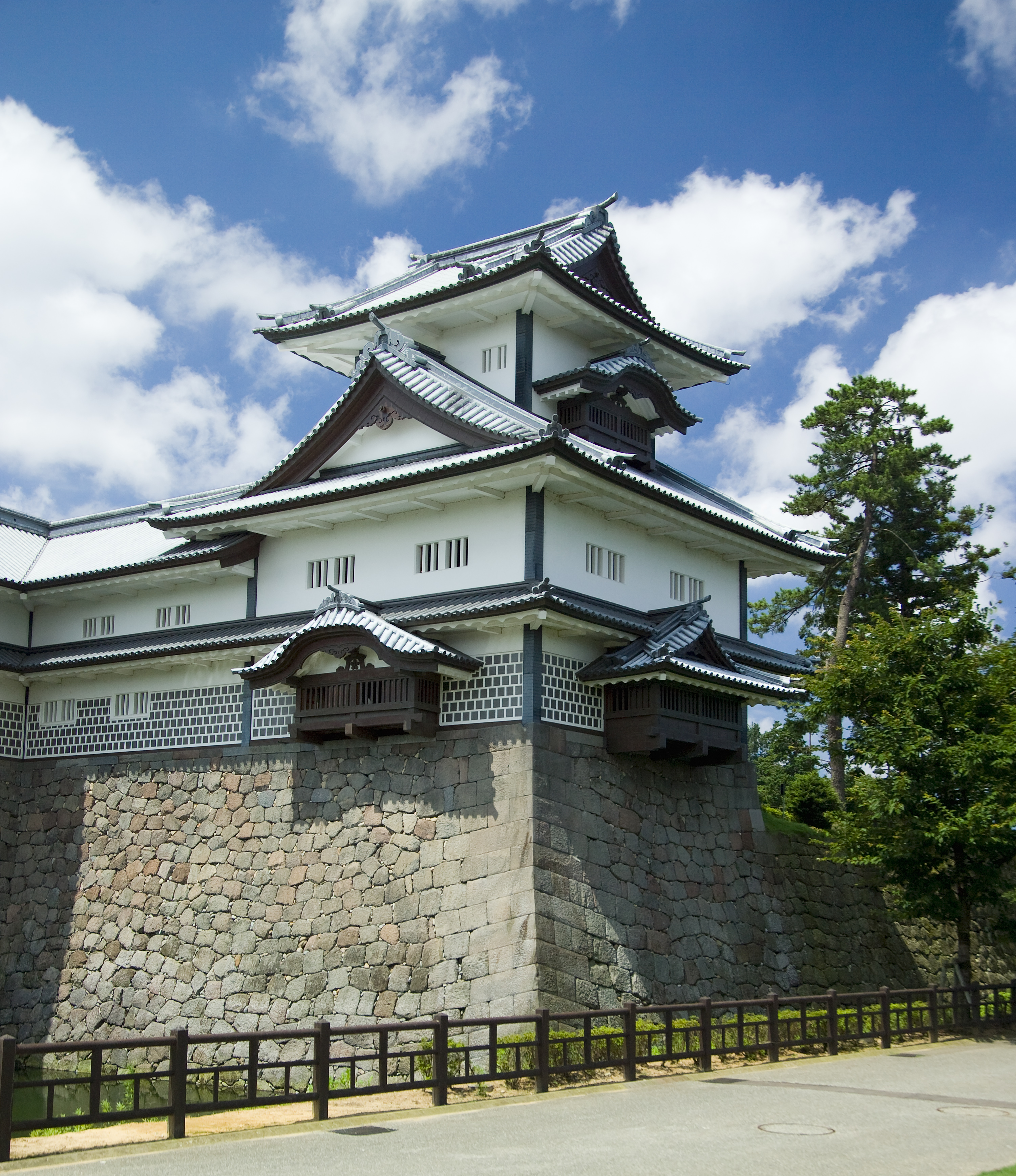 Kanazawa Castle Hishi Yagura 金沢城 菱櫓